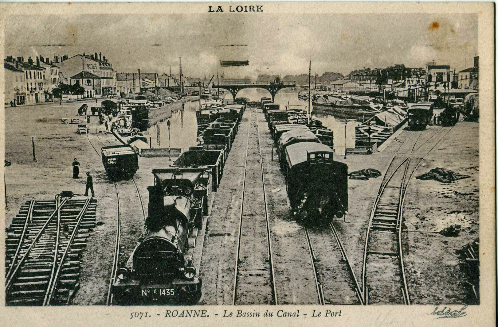 Carte postale ancienne éditée par Ideal, n°5071: ROANNE - Le Bassin du Canal - Le Port